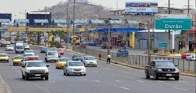 Duran city